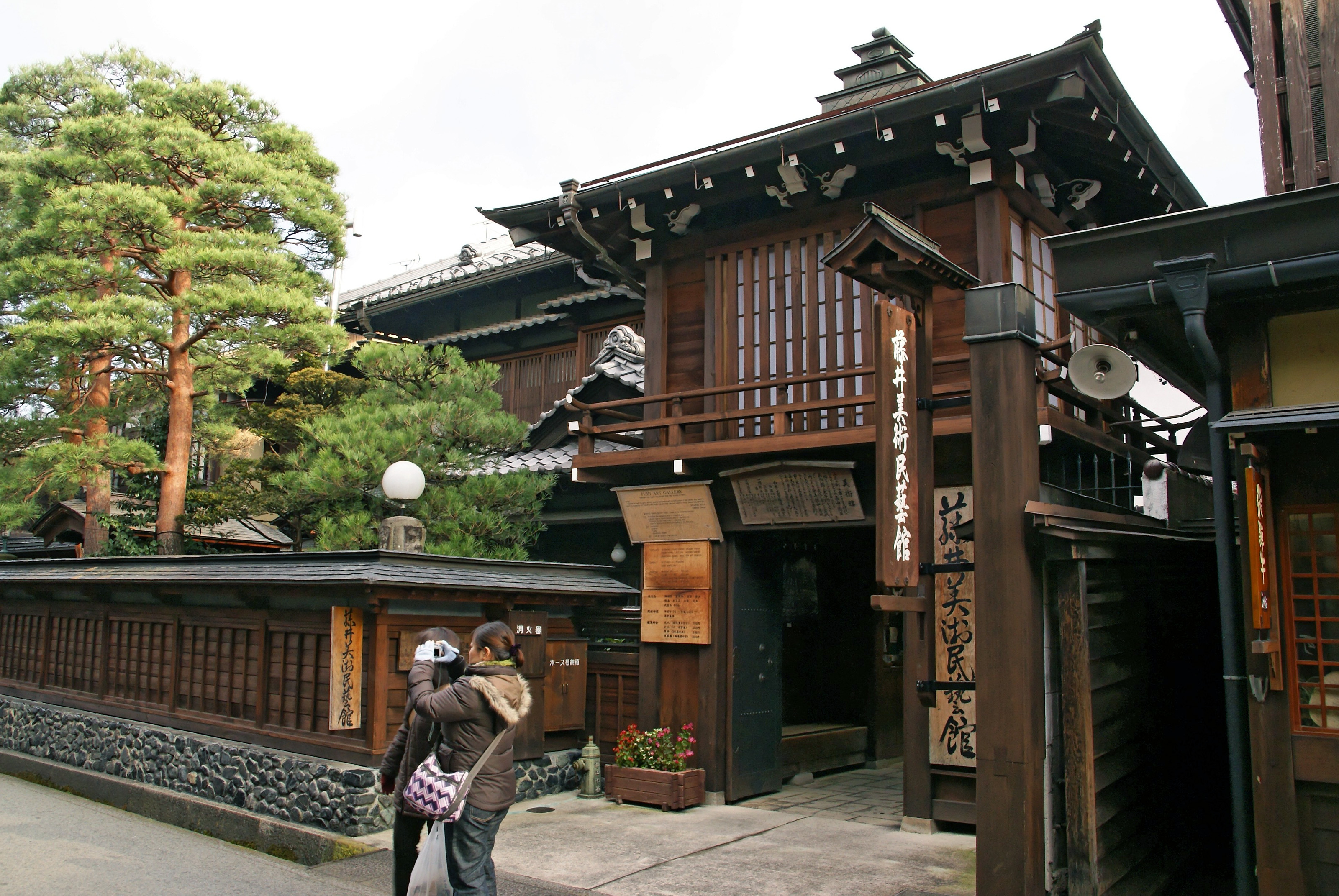 Fujii Bijutsu Mingei-kan in Takayama, Gifu prefecture, Japan